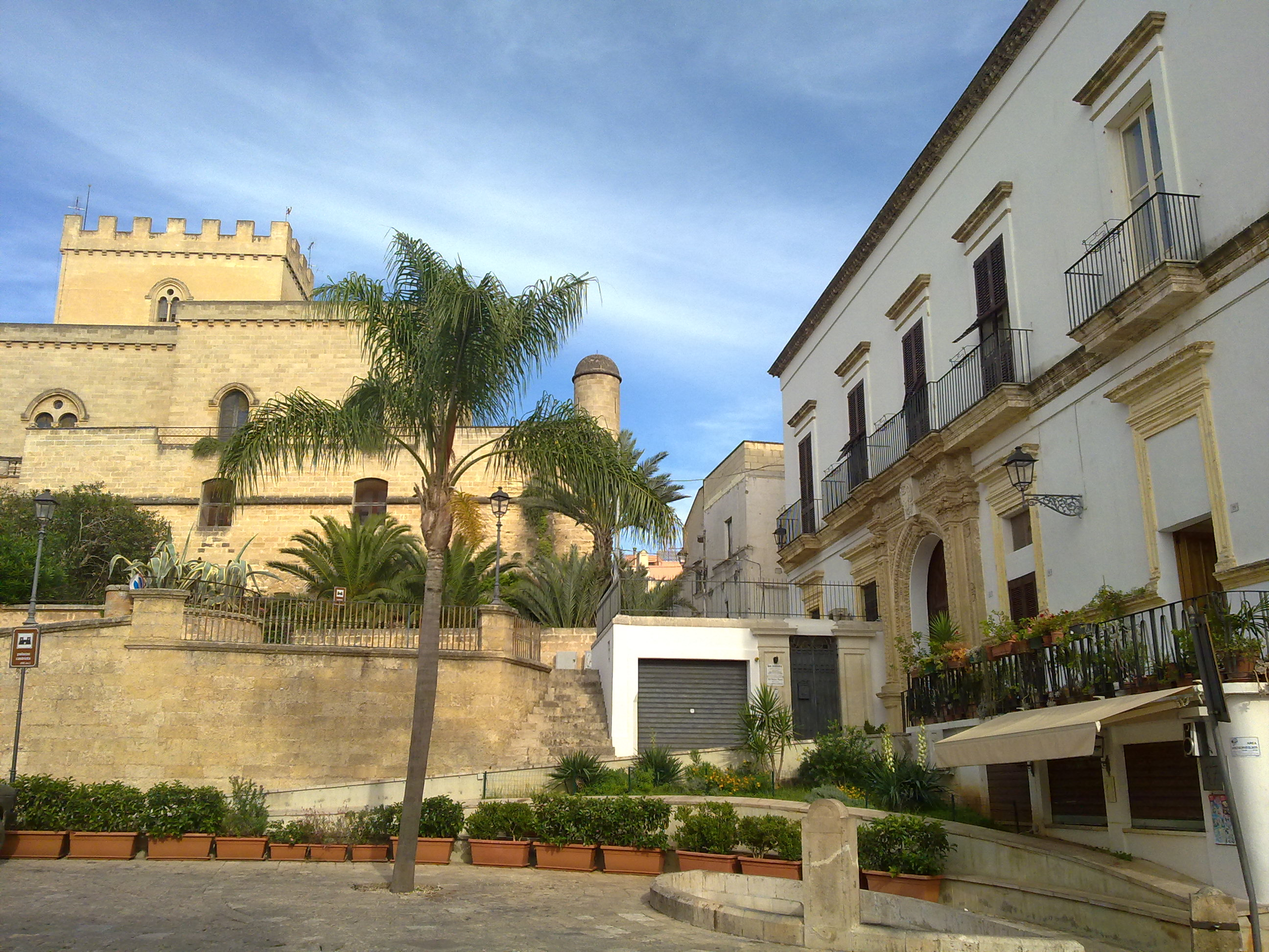 Castello e Palazzo Vinci Parabita, Lecce